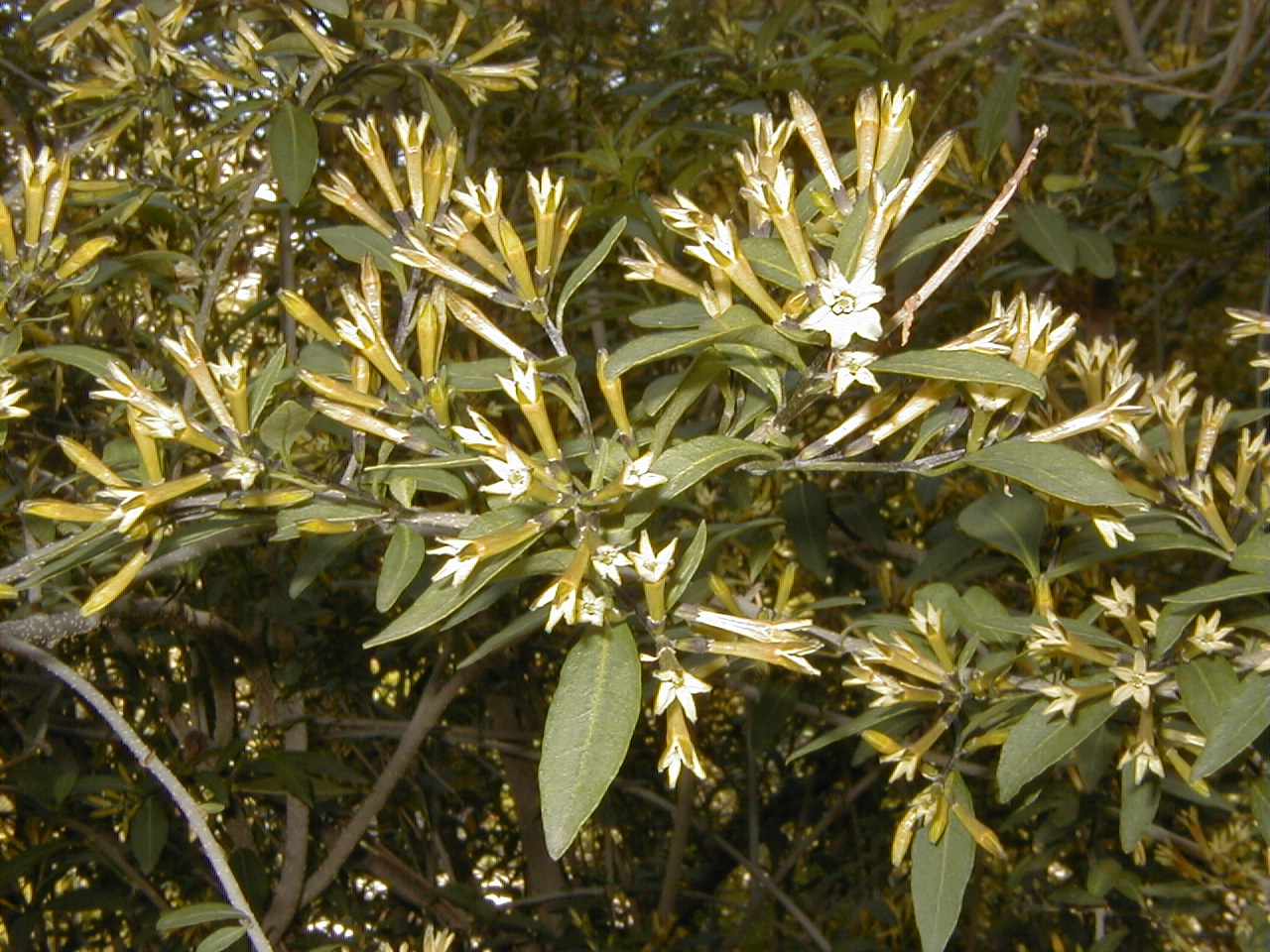 Cestrum parqui. Real Jardín Botánico de Madrid.